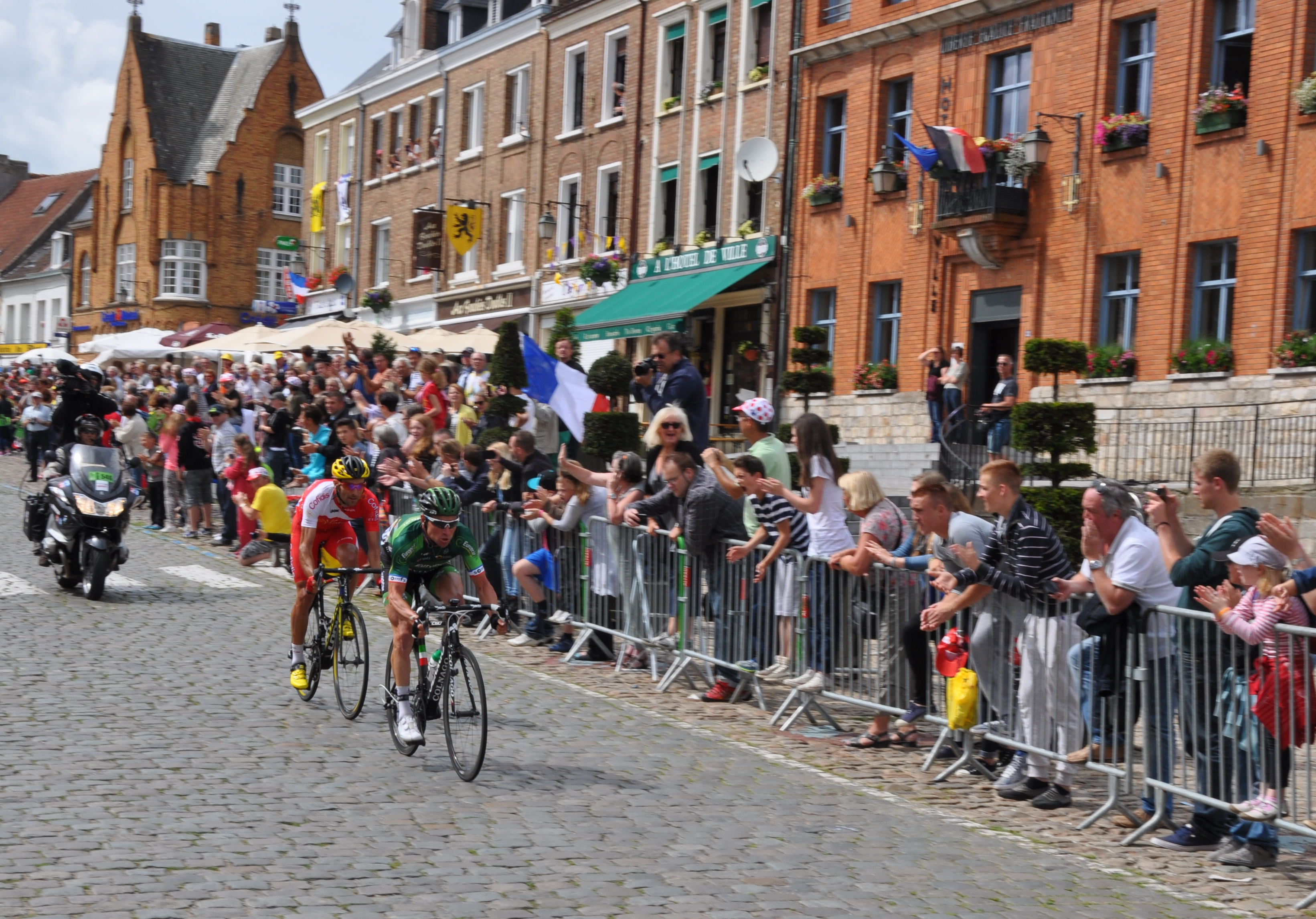 Thomas Voeckler passe en tête à Cassel, suivi de Luis Ángel Maté avec encore près de 2 minutes sur le peloton.